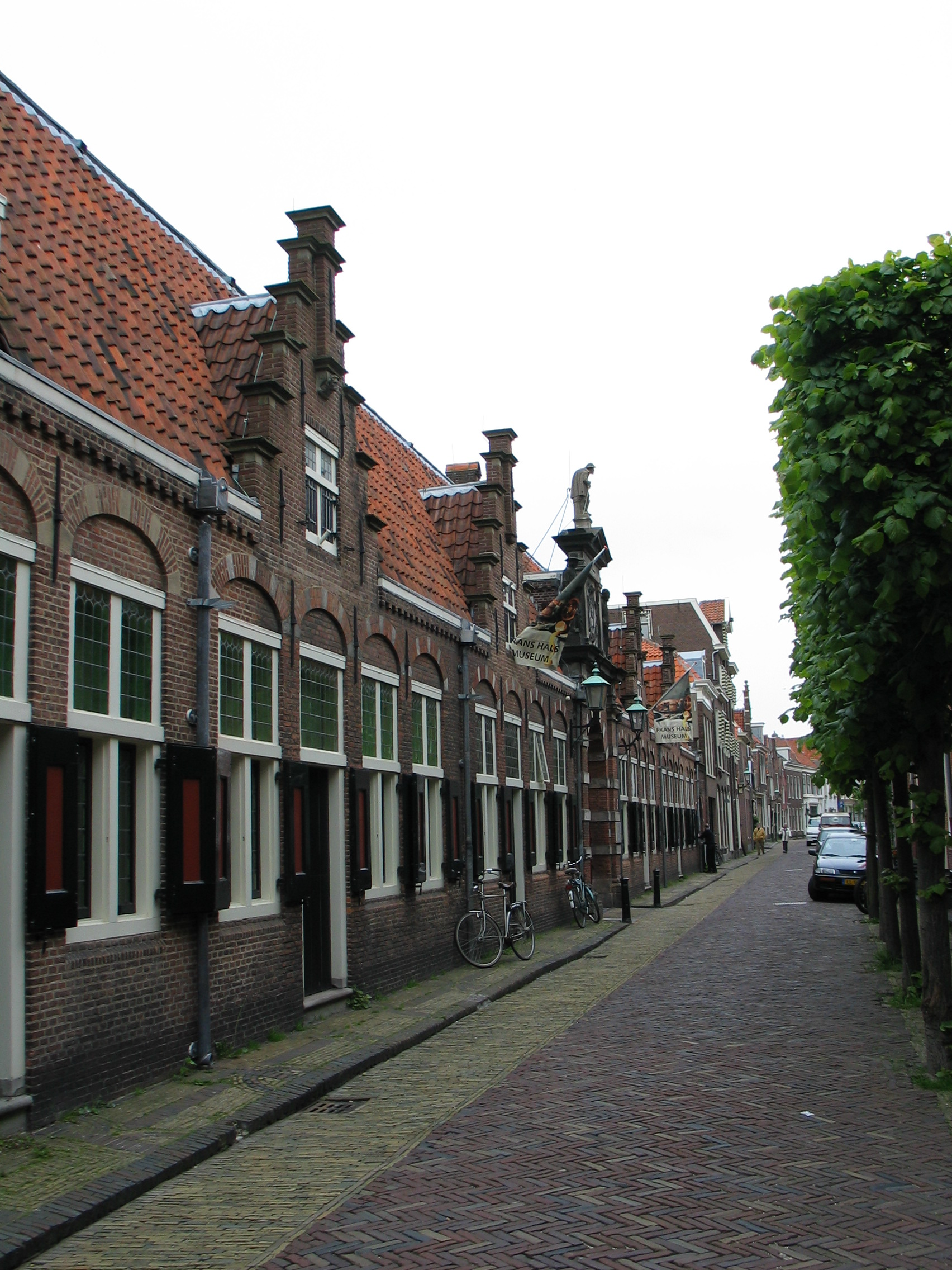 Frans Hals Museum te Haarlem. De foto is 16 mei 2005 gemaakt door H. de Vegt.